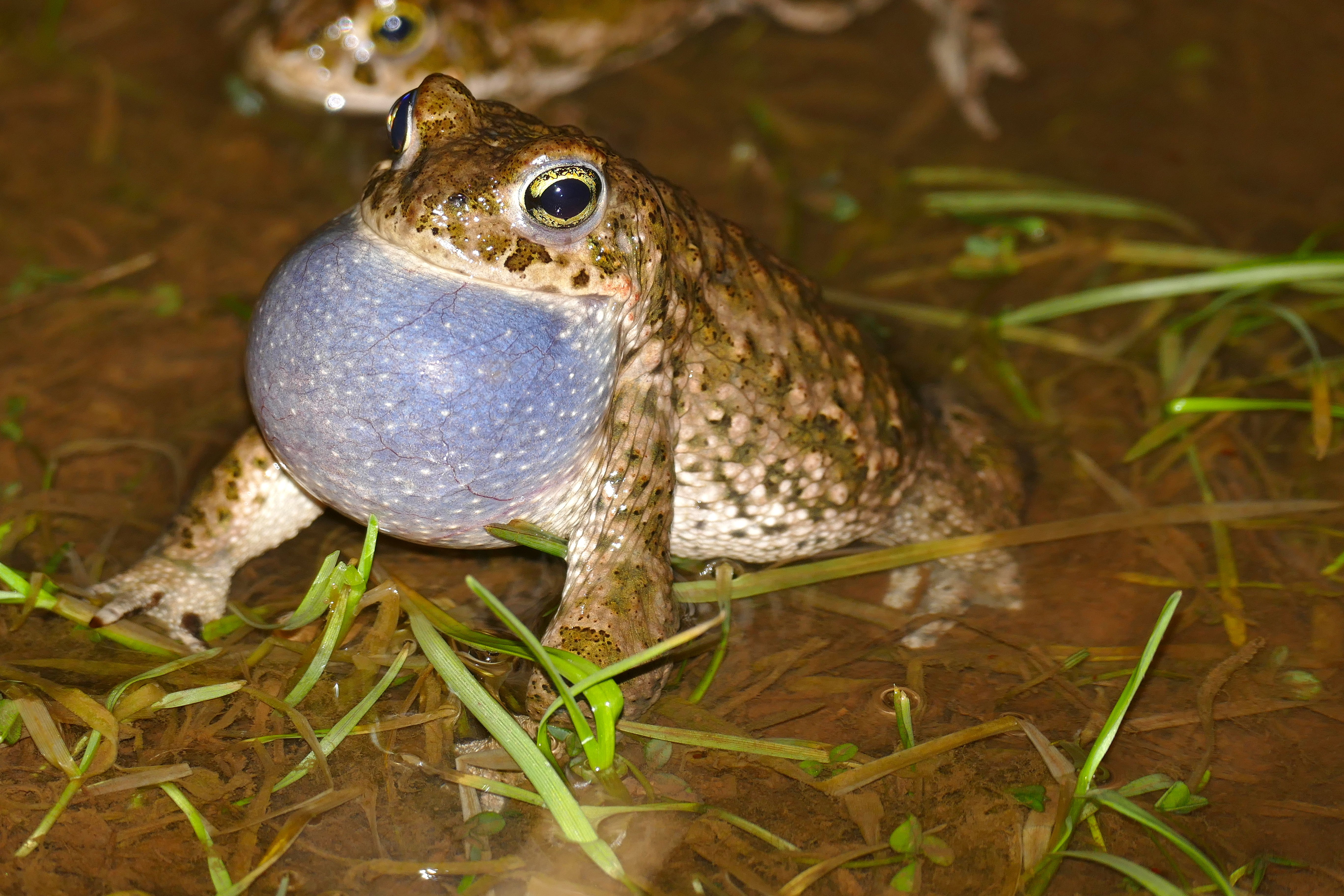 Lac des Rives, Les Rives, Hérault, FRANCE